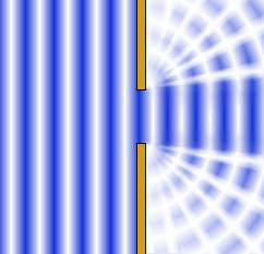 Vlneni pri pruchodu malou sterbinou (k demonstraci difrakce)